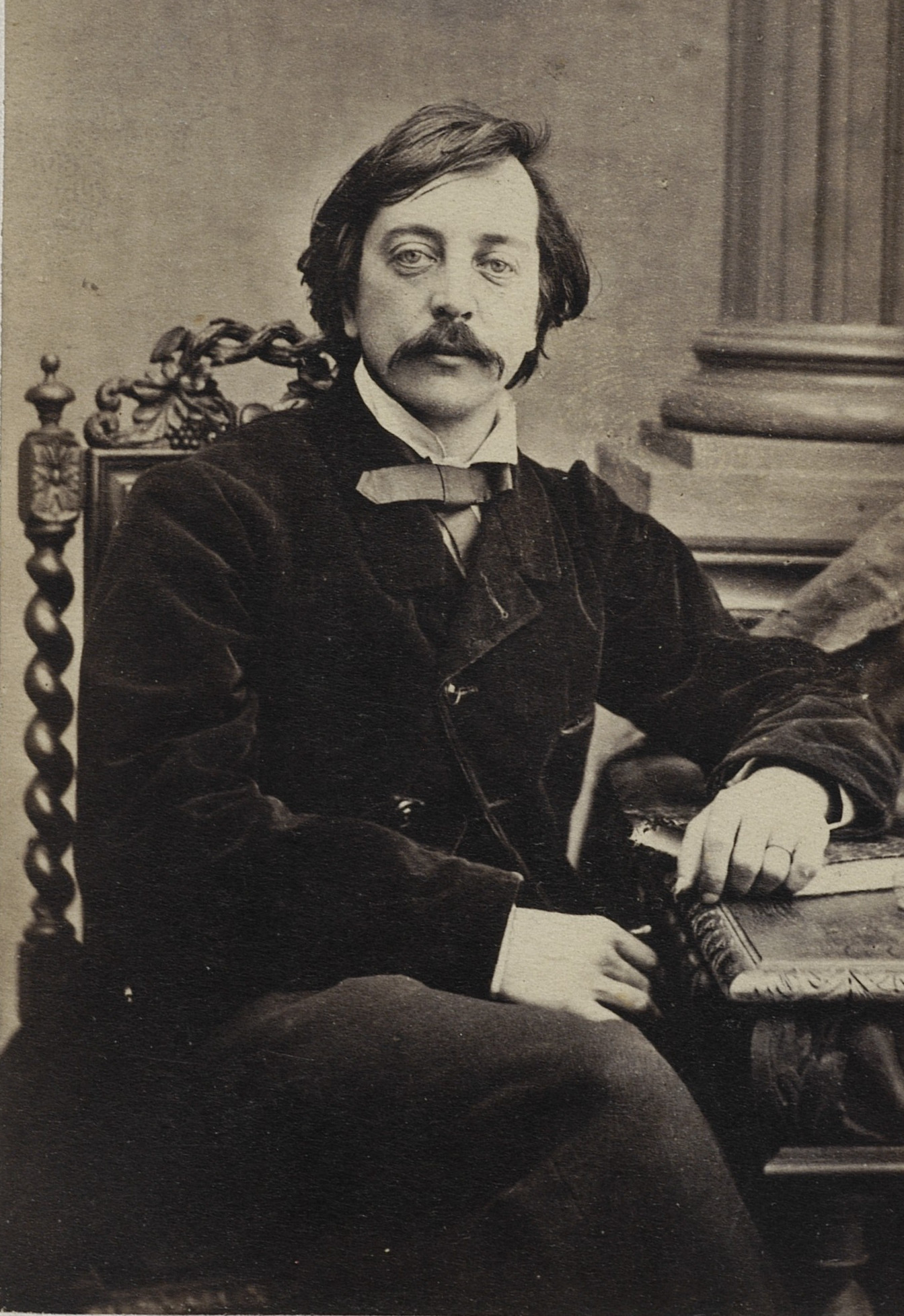 Tadeusz Gorecki